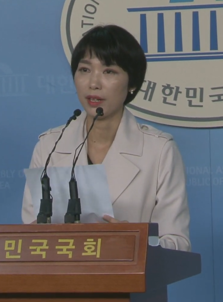 조국 사태에 관련해 브리핑을 하고 있다.